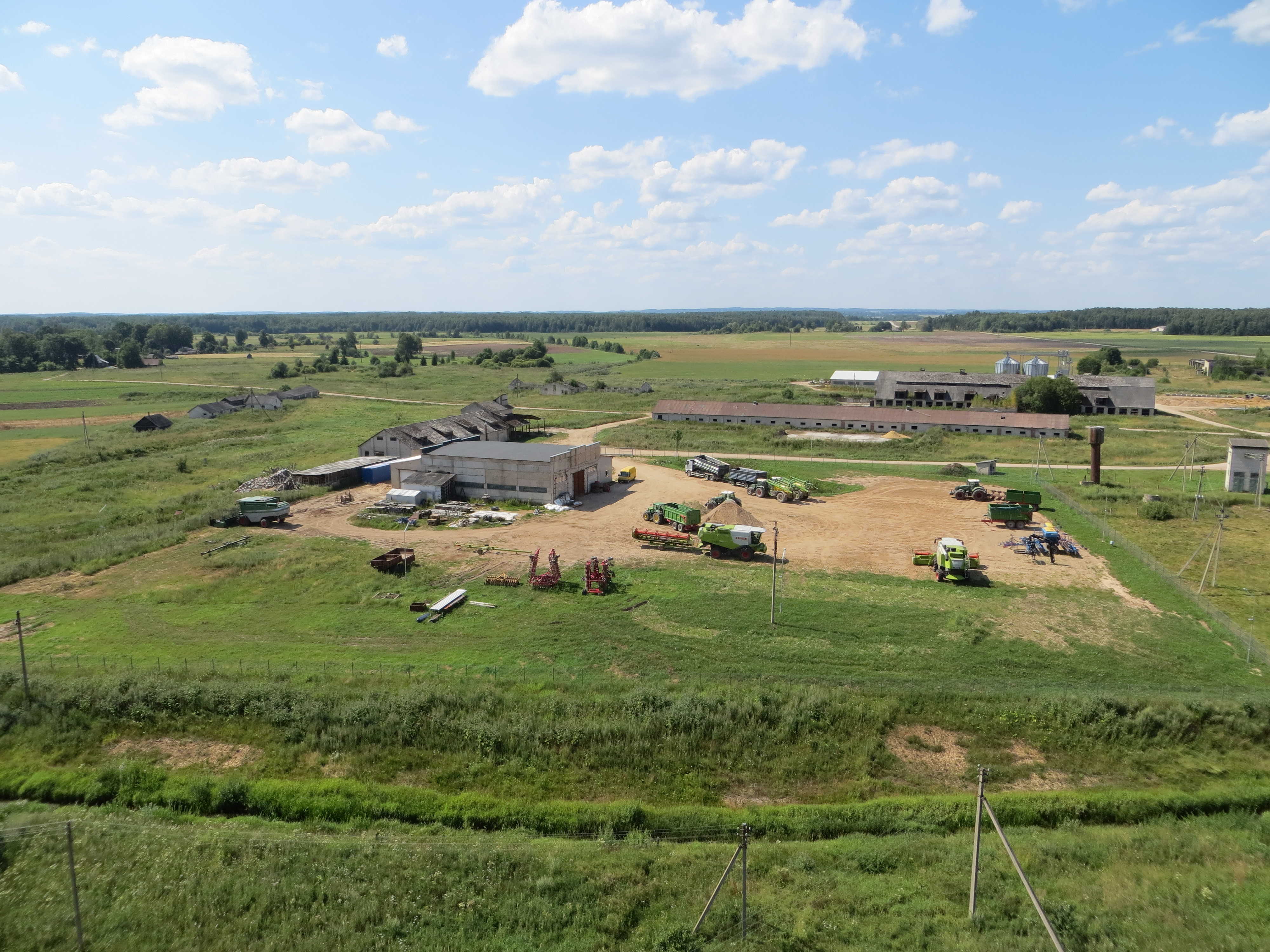 Gilūtos, Lithuania